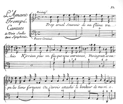 הhe:רצ'יטטיב הפותח מתוך הhe:קנטטה "המאהב המרומה" מאת לואי ברנייה. השורה התחתונה בכל צמד שורות היא שורת הקונטינואו.